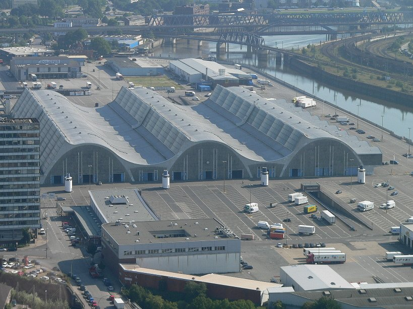 Großmarkthallen in Hamburg. Architekt: Bernhard Hermkes